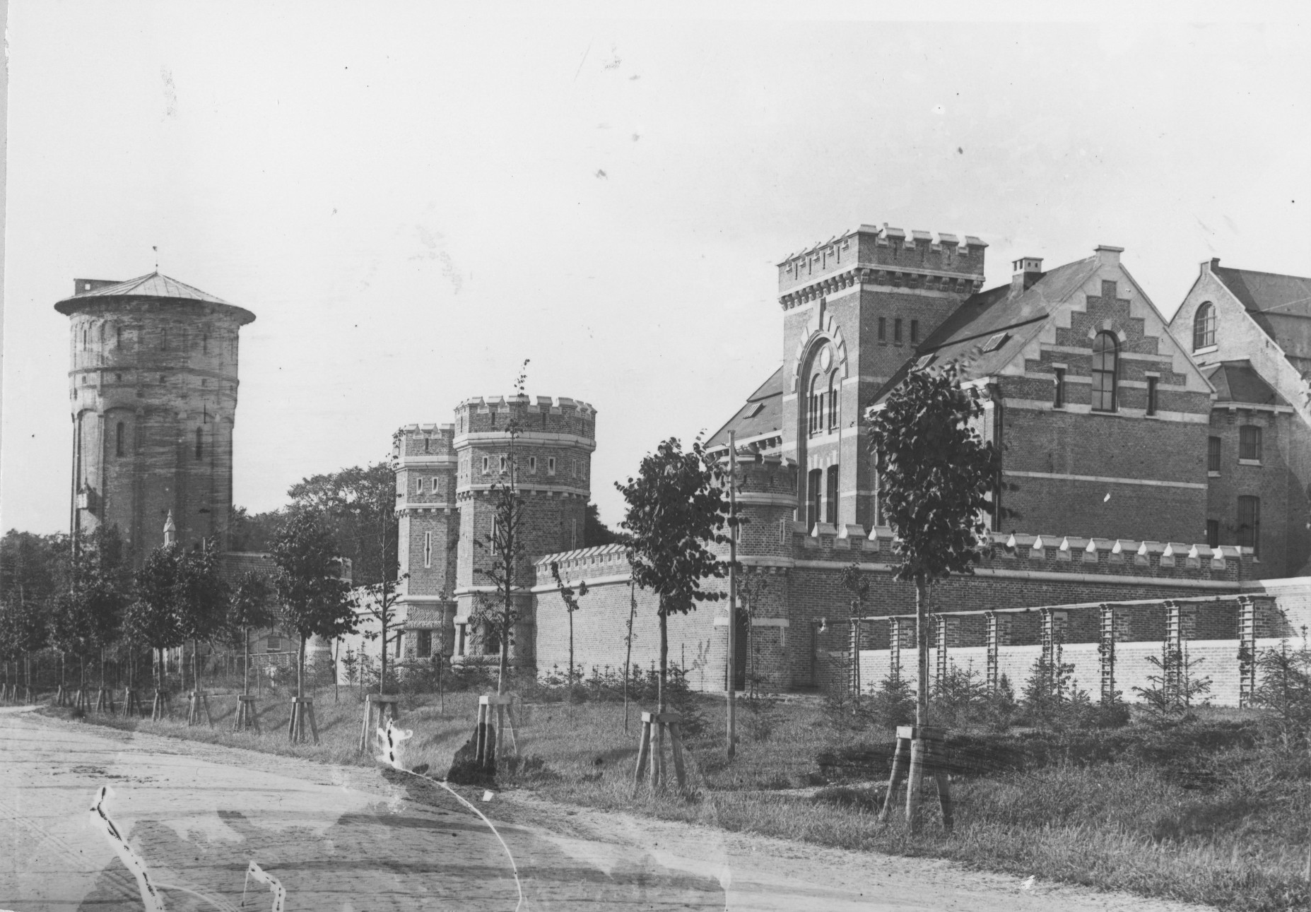 De Cellulaire Gevangenis (nu Van Mesdagkliniek) aan de Hereweg in Groningen, vlak na de bouw. Links de voormalige watertoren bij het Sterrebos.